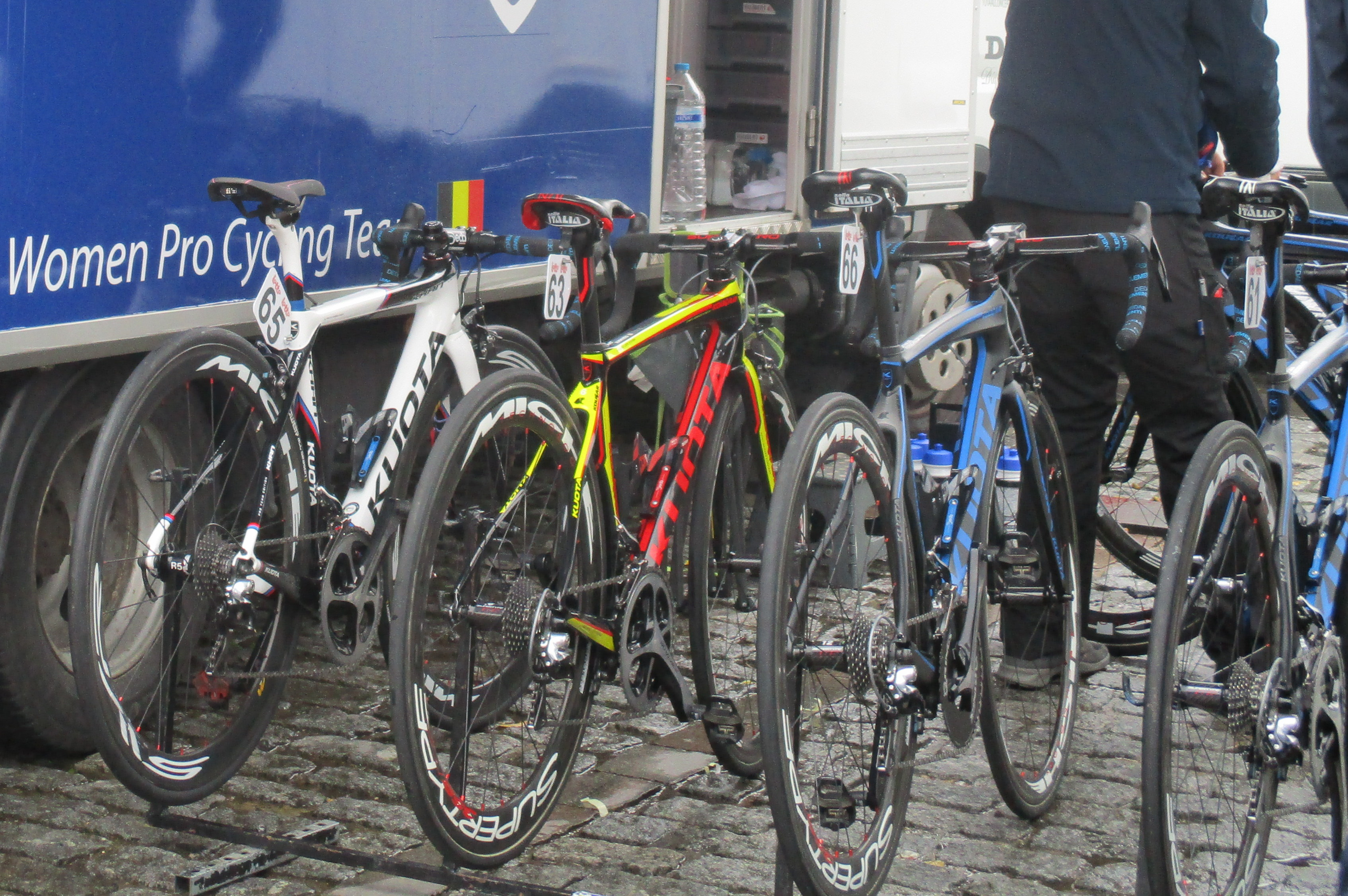 Start van de 3e en laatste etappe van de Lotto Belgium Tour 2017 in Geraardsbergen.